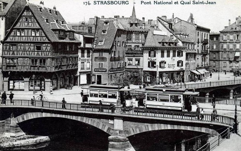 Tramway de la ligne 7 (Hoenheim - Breuschwickersheim) ou 8/9 (place de Bordeaux - Porte de Schirmeck - Lingolsheim) sur le pont National. Motrice type A n° 121 construite par MAN en 1908 ; équipement électrique par AEG. Série n° 116-144.